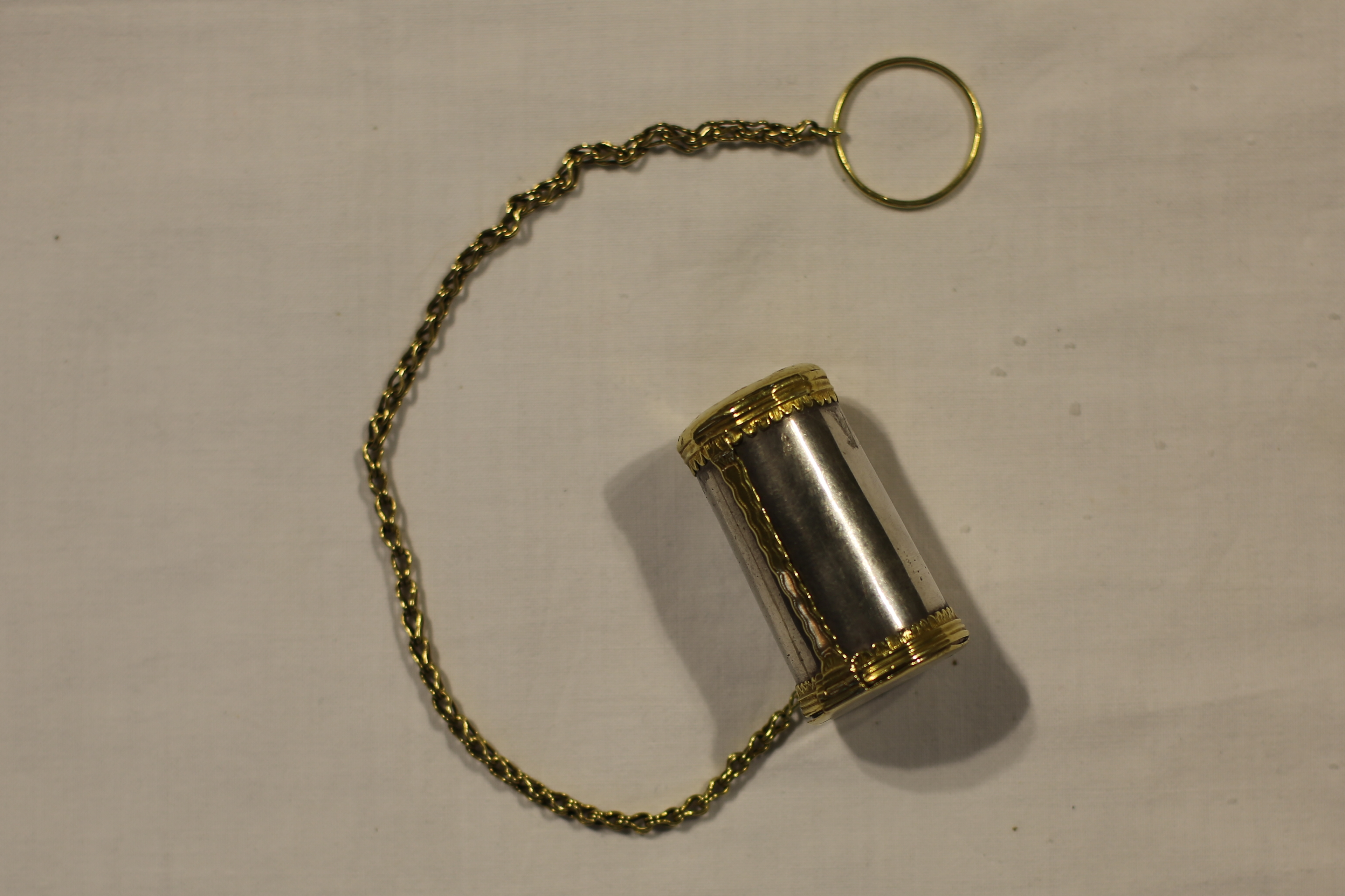 Reliquaire du doigt de saint Jean Baptiste, conservé dans le trésor de Saint-Jean-du-Doigt